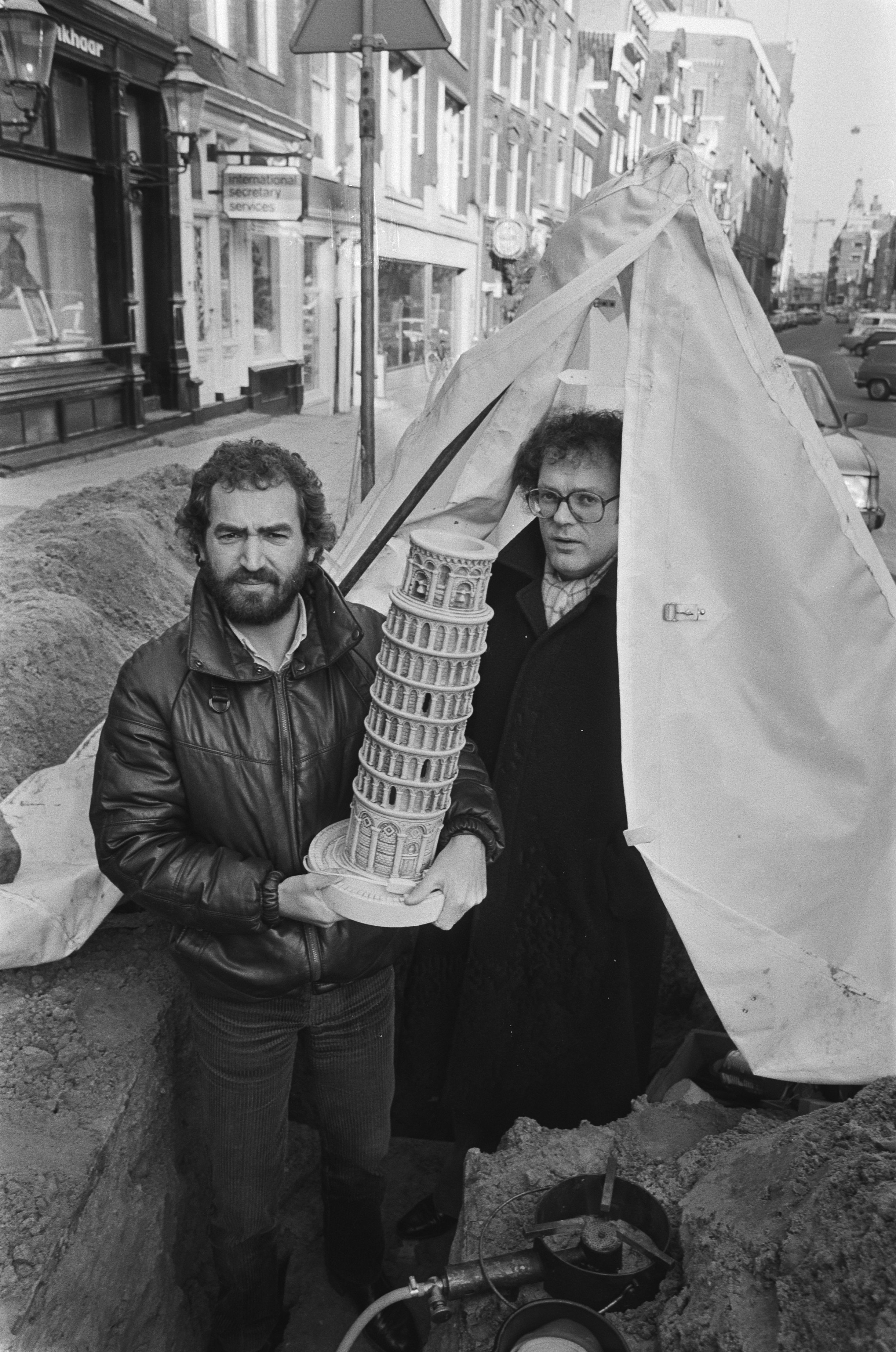 Collectie / Archief : Fotocollectie Anefo Reportage / Serie : [ onbekend ] Beschrijving : Henk Spaan en Harry Vermeegen maken TV-programma bij de VARA, genaamd "Pisa" Datum : 6 januari 1982 Trefwoorden : TV-programma's Persoonsnaam : Spaan, Henk, Vermeegen, Harry Instellingsnaam : VARA Fotograaf : Bogaerts, Rob / Anefo Auteursrechthebbende : Nationaal Archief Materiaalsoort : Negatief (zwart/wit) Nummer archiefinventaris : bekijk toegang 2.24.01.05 Bestanddeelnummer : 931-8960